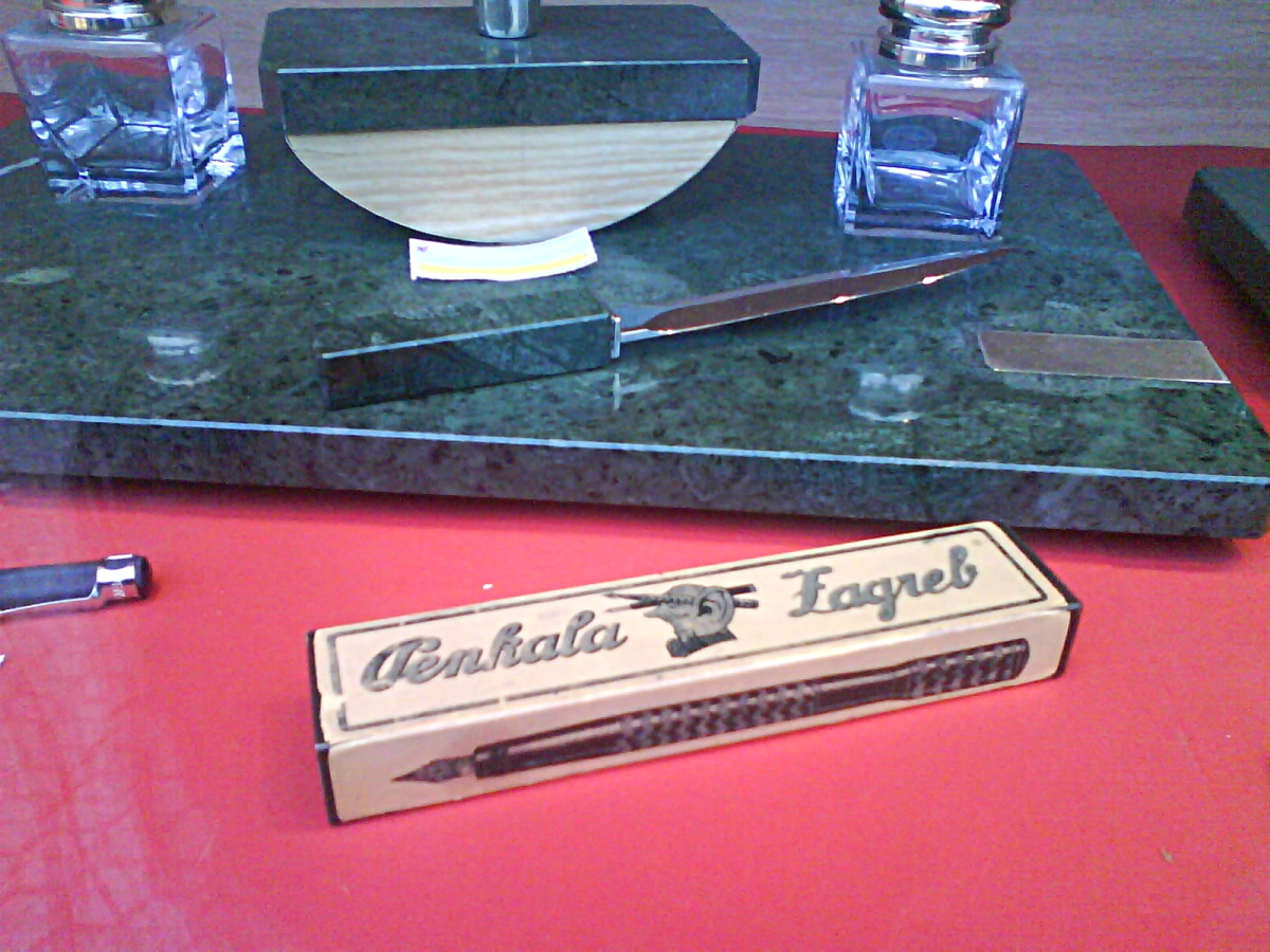 Penkala, Zagreb